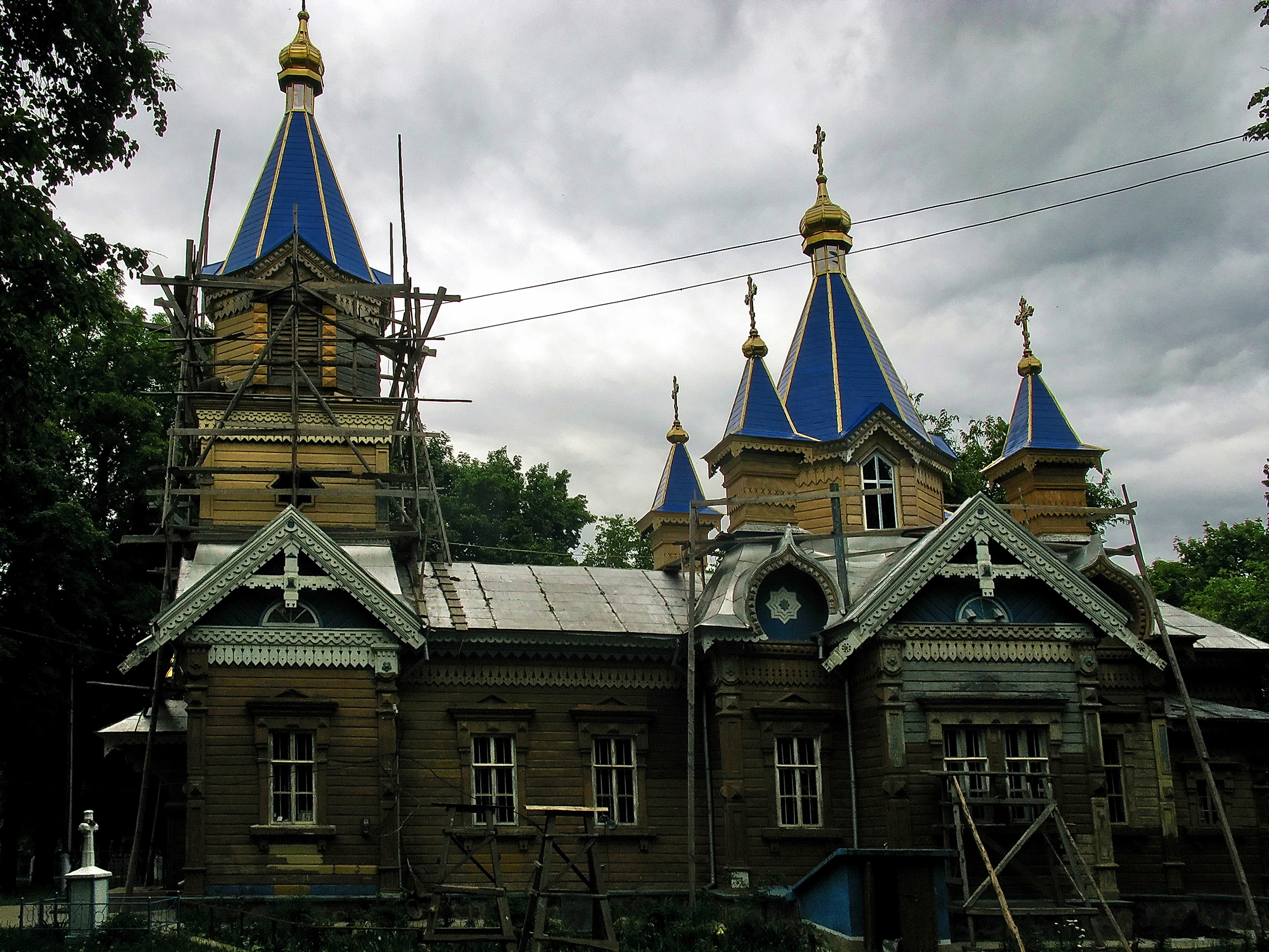 Михайлівська церква (дер.), с. Романківці